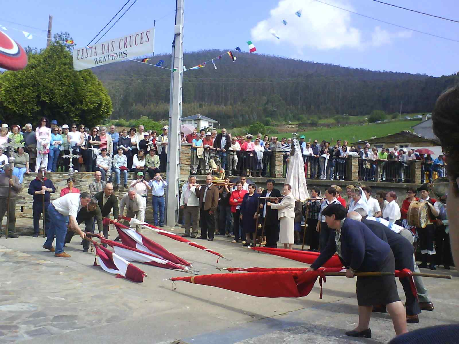 Romaría das Cruces en 2008